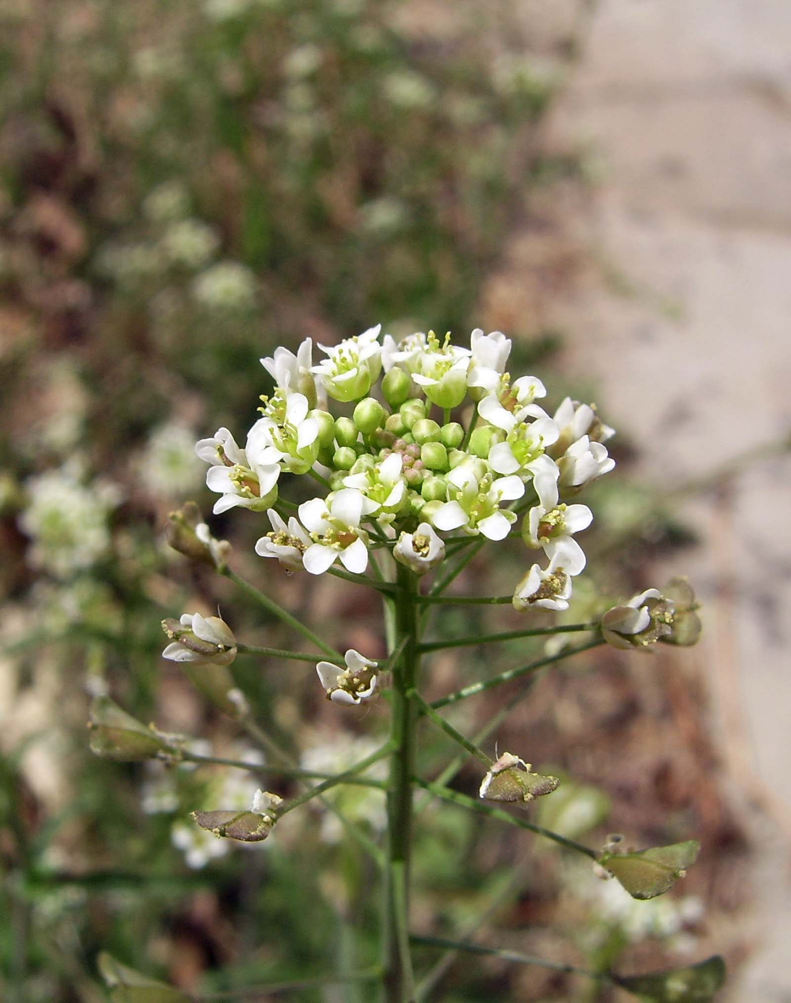 荠菜的花